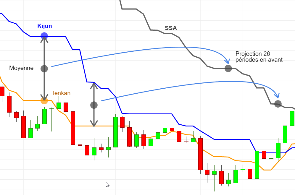 Ichimoku - SSA